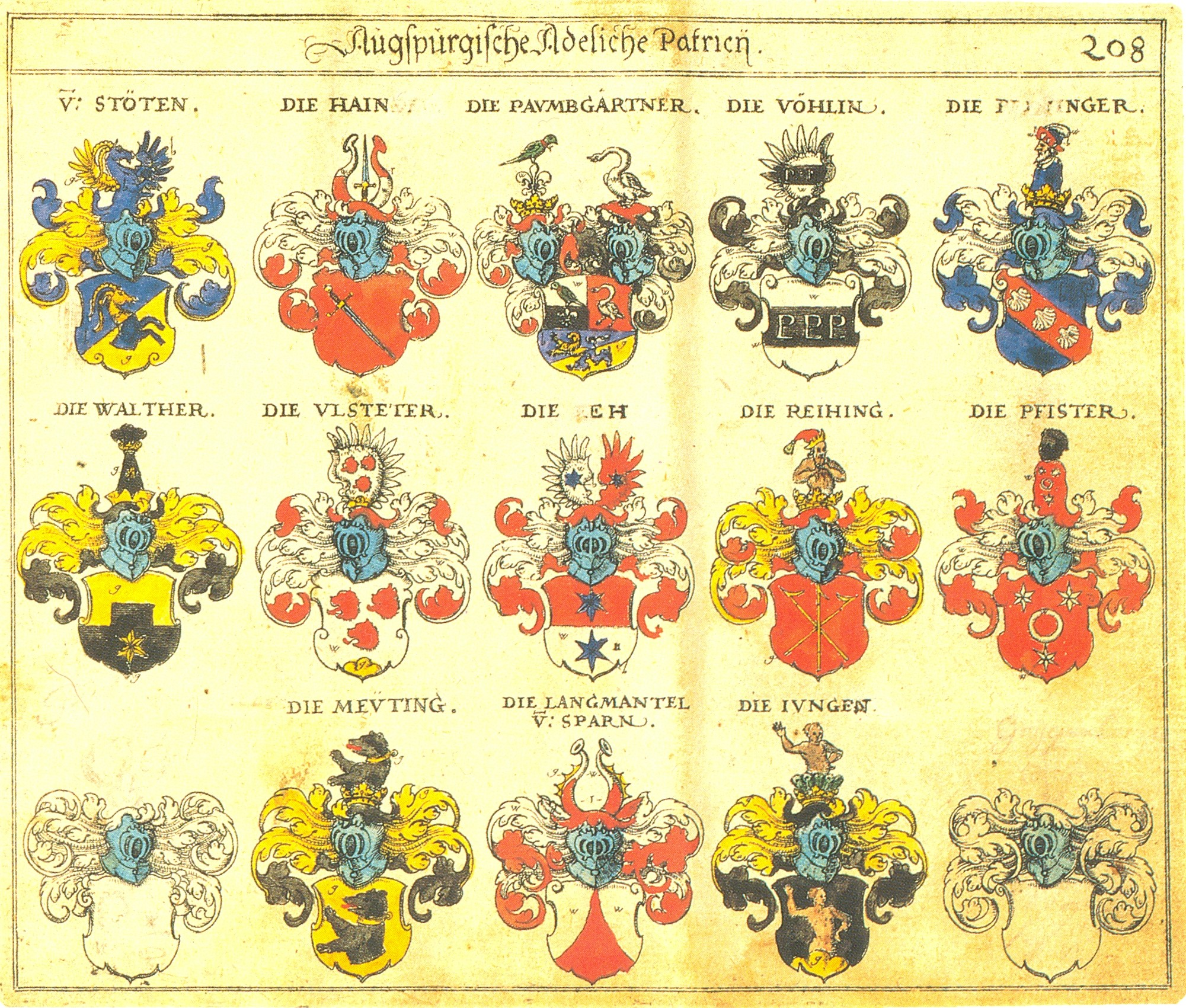 Johann Siebmacher: New Wappenbuch eingescannt aus: Horst Appuhn (Hrsg.), Johann Siebmachers Wappenbuch. Die bibliophilen Taschenbücher 538, 2. verb. Aufl , Dortmund 1989 Patrizier uns Adel Augsburg Blatt 208